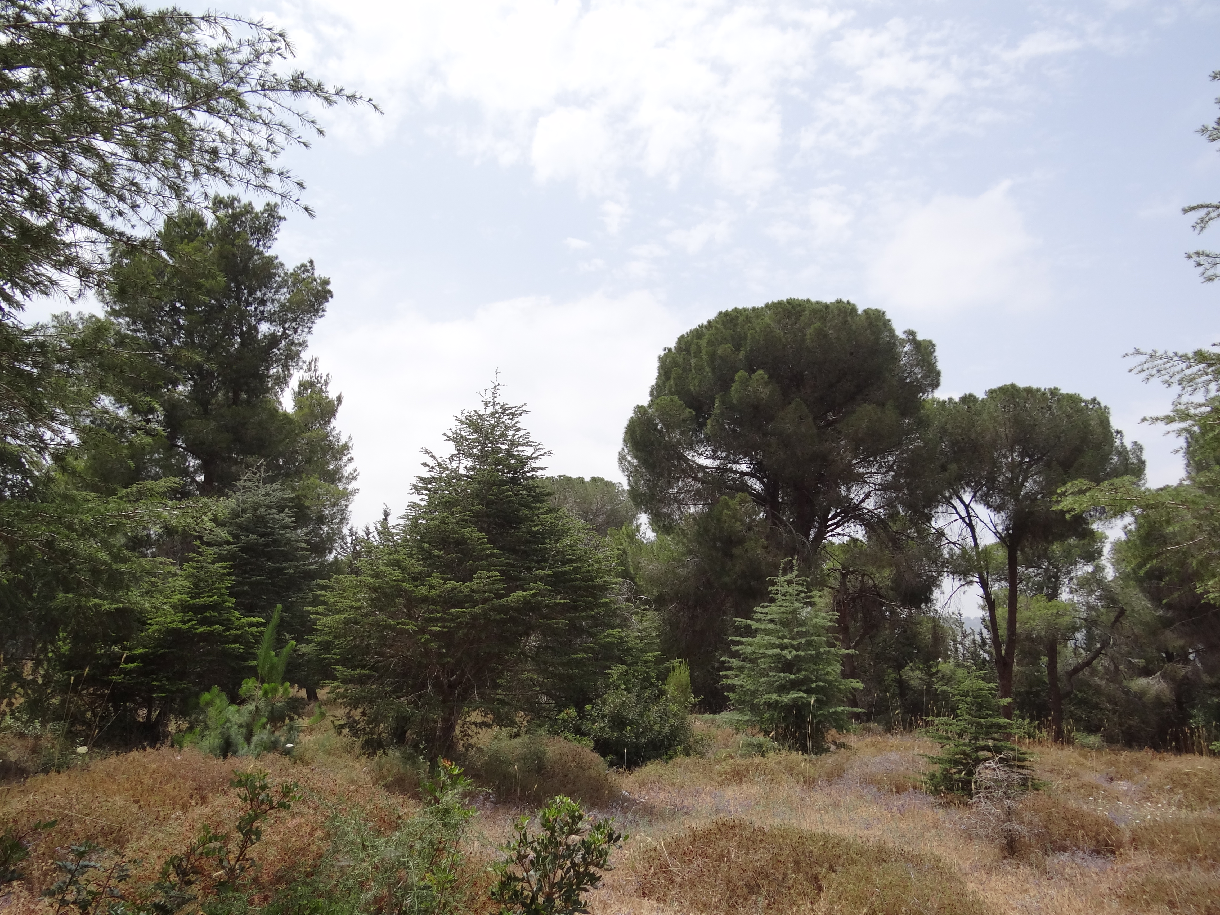 חלקה של עצי ארזים נטועים למרגלות הר דבורה בגליל התחתון על דרך נוף יער בית קשת בקרבת עצי האורן המנדטורים